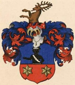 Mohrenschildti suguvõsa aadlivapp